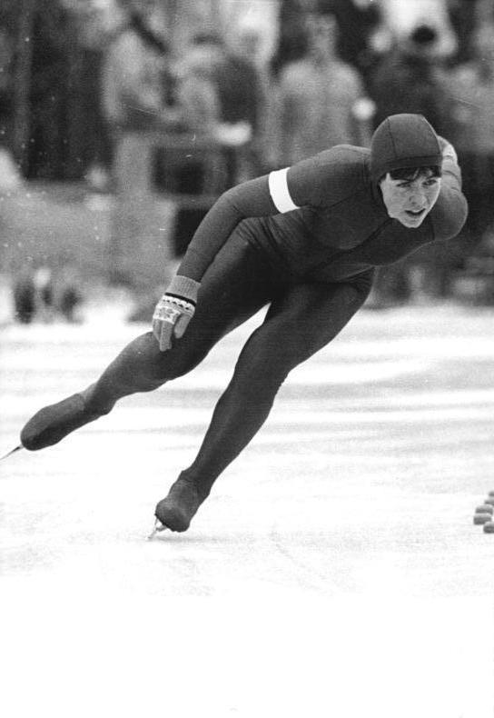 Gabi Zange-Schönbrunn ADN-ZB Mittelstädt 6.12.87 Berlin: Gabi Zange-Schönbrunn erzielte am 5.12.87 beim Olympia-Test in Calgary (Kanada) über 3000m einen Weltrekord mit einer Zeit von 4:16,76 min. (Foto von einem früheren Wettkampf)